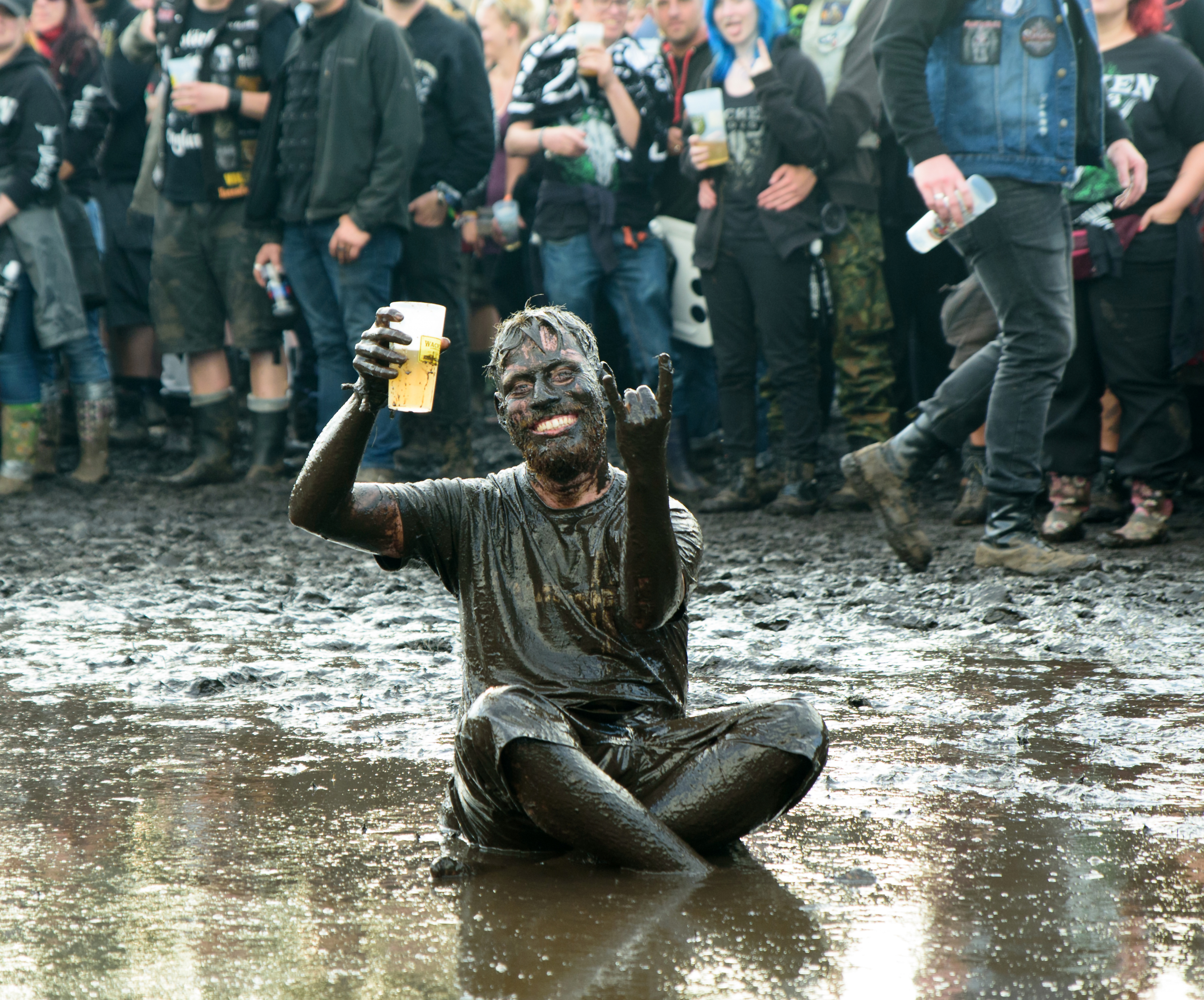 Impressionen vom Wacken Open Air 2016